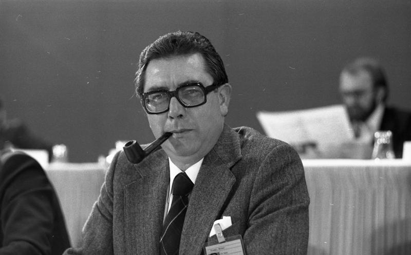 28. Ordentlicher Bundesparteitag der FDP in der Kieler Ostseehalle. (Werner Klumpp) 6.-8.11.1977